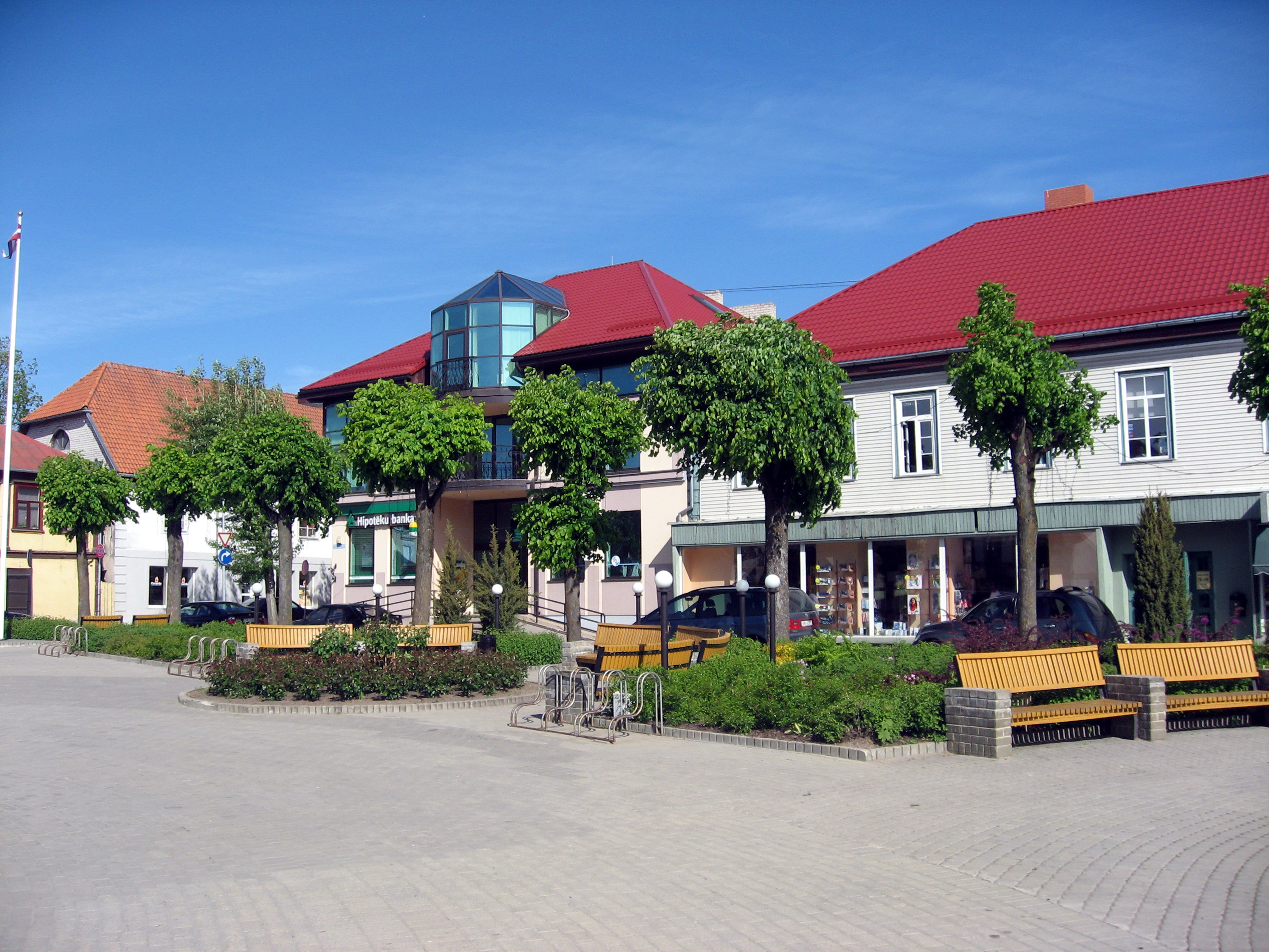 Tukums